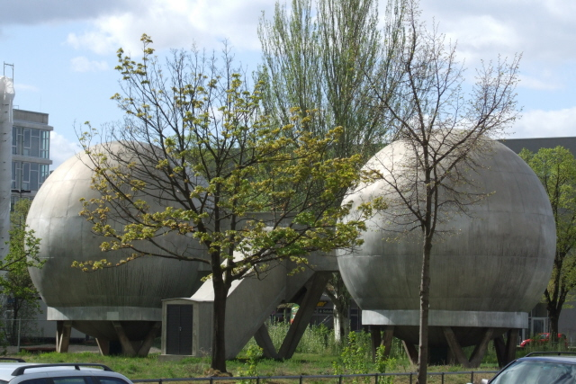 Die isothermischen Kugellaborbauten in Berlin-Adlershof Architekt: Horst Welser Fotograf: Harald Rossa Datum: 18. April 2007 Höher aufgelöste Version ist verfügbar